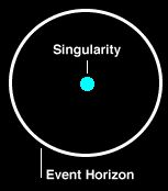 Musta augu läbilõige